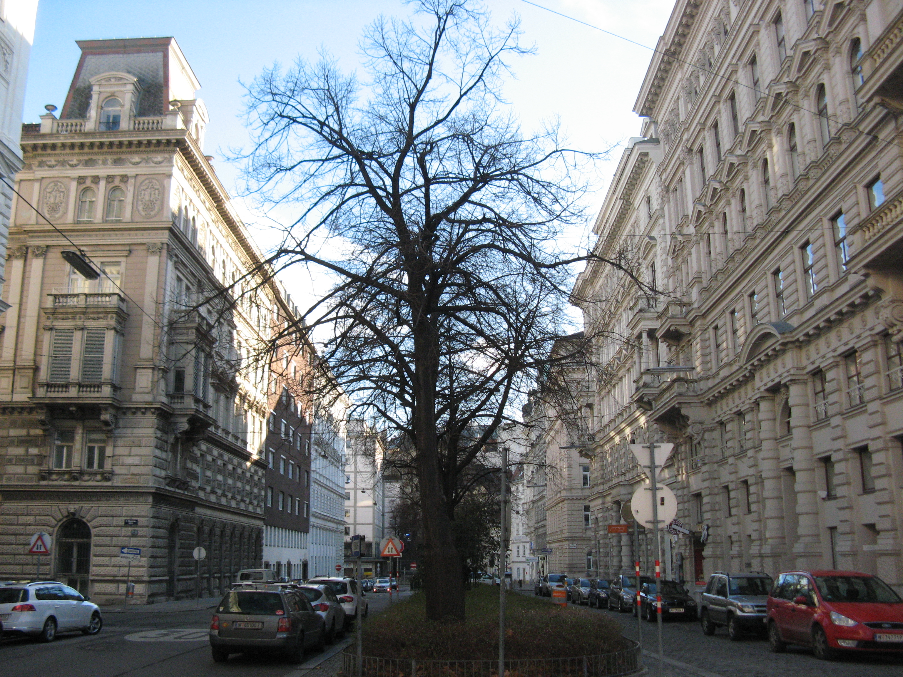 Börsegasse vom Börseplatz gegen Concordiaplatz gesehen, Wien-Innere Stadt